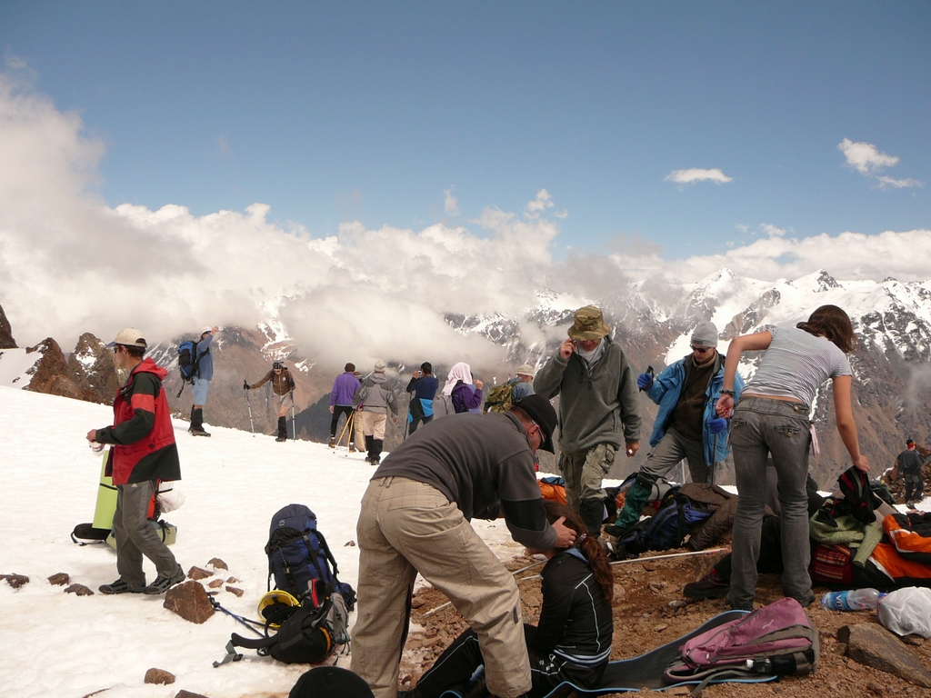 Альпиниада "Нурсултан-2009". Перевал Карлытау (Комсомол).